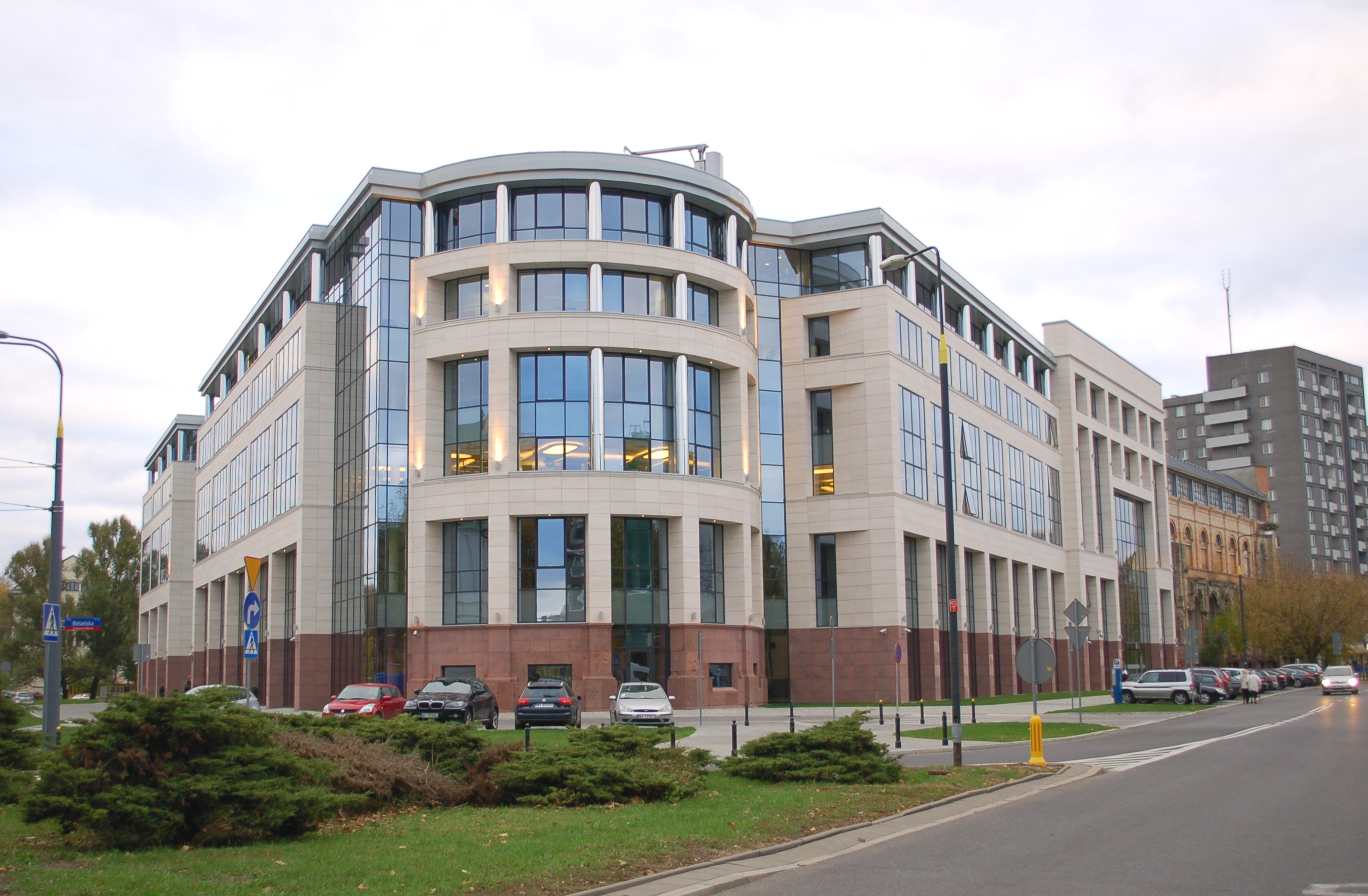 Senator Warsaw